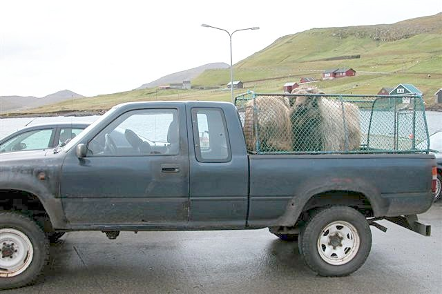 Szene auf den Färöern: Zwei Schafe haben auf dem Markt in Porkeri ihren Besitzer gewechselt. Auf seinem parkenden Pickup warten sie nun auf eine Fahrt ins Ungewisse.